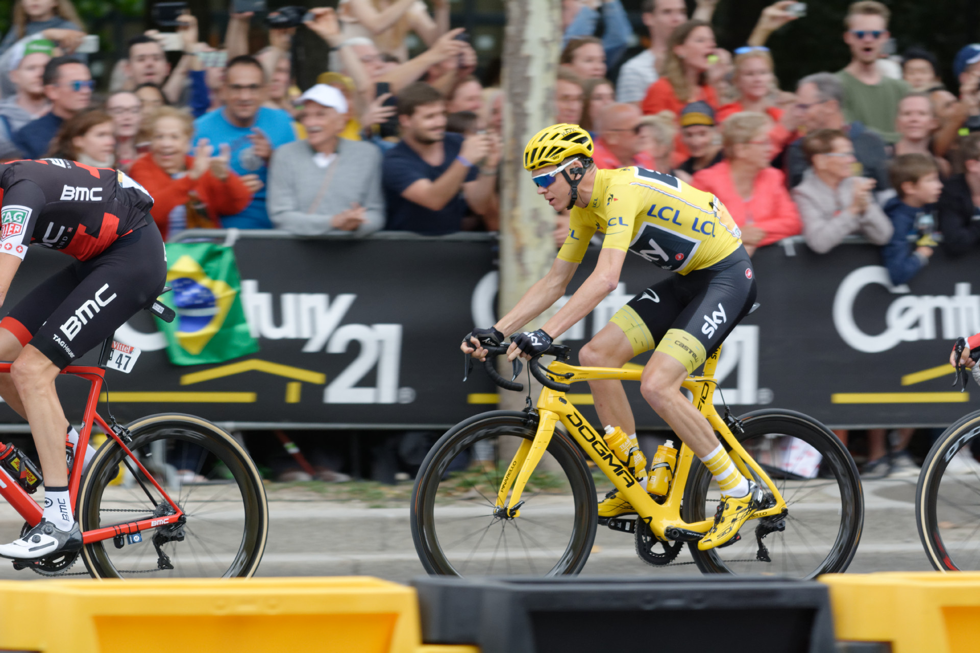 D71_8456_DxO